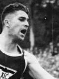 Zentralbild Wen-Wlo. Deutsche 4 x 100m Staffel lief Weltrekord. Im Rahmen des Rudolf-Harbig-Gedenksportfestes am Sonnabend und Sonntag, dem 29. und 30.9.1956, in Dresden gab es die herausragende Leistung im 4 x 100m Staffellauf der Damen. In der Besetzung Erika Fisch (Bundesrepublik), Christa Stubnick, Gisela Köhler und Bärbel Mayer (alle DDR) wurde mit 45,1 Sek. ein neuer Weltrekord aufgestellt und die alte Bestleistung der sowjetischen Staffel um eine Zehntel Sekunde verbessert. UBz: Stabwechsel der gesamtdeutschen 4 x 100-m-Staffel der Herren. Der Karlsruher Heinz Fütterer (links) übergibt an den Hallenser Manfred Steinbach. Information added by Wikimedia users. Heinz Fütterer. → This file has been extracted from another image: File:Bundesarchiv Bild 183-41708-0008, Heinz Fütterer, Manfred Steinbach.jpg.